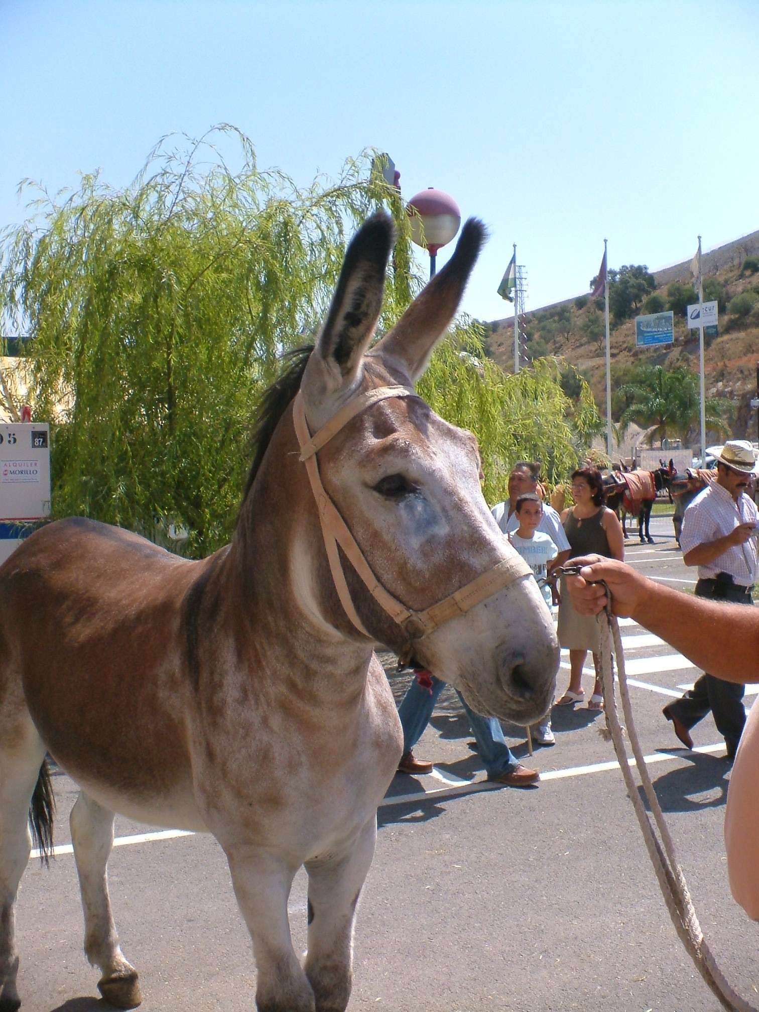 semental de asno andaluz detalle cabeza 1er. Certamen raza asnal andaluza Coin (Malaga) 206